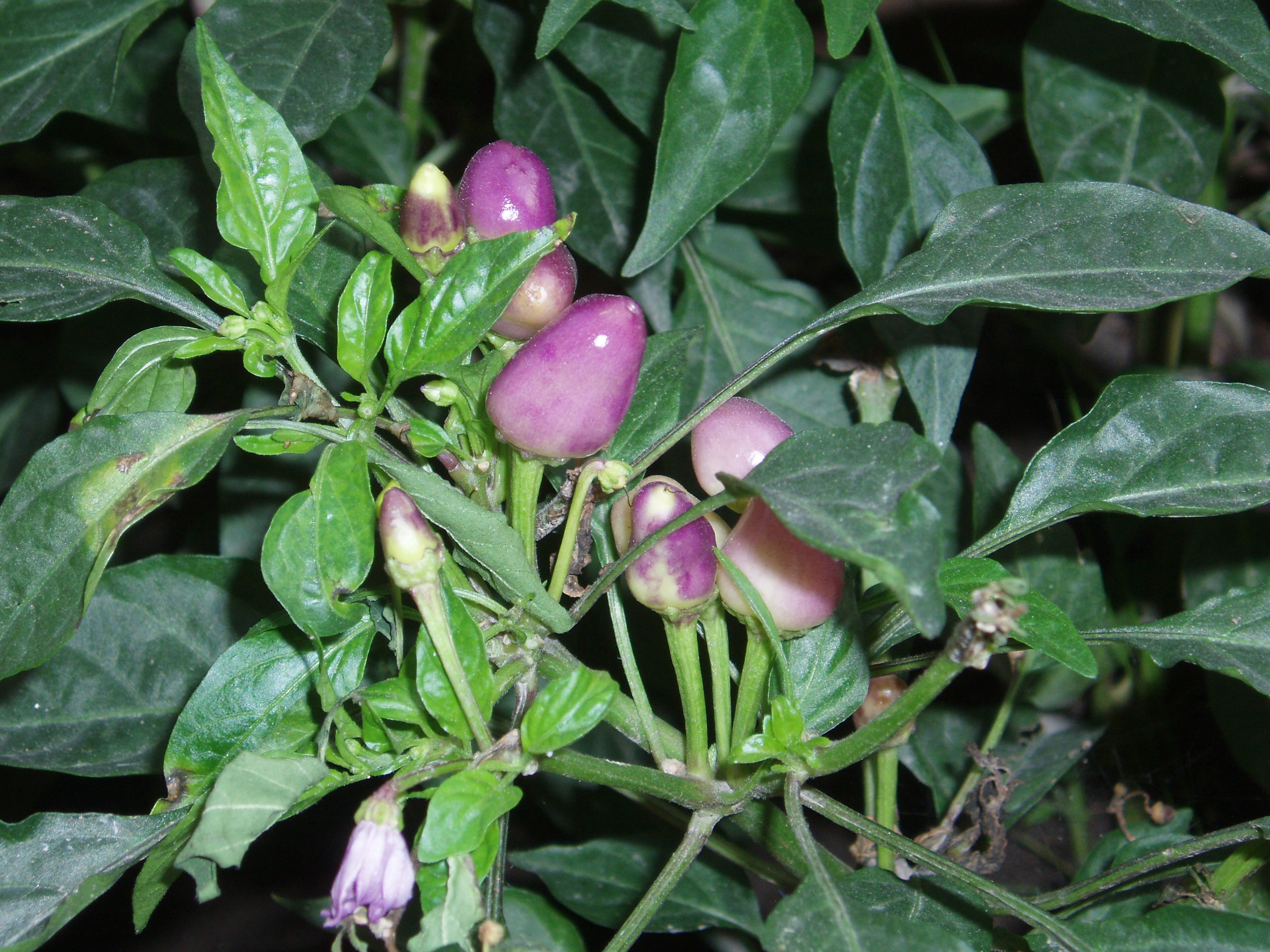 Cone pepper (Capsicum annuum var. conoides)